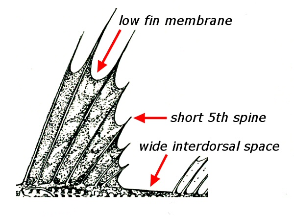 First dorsal fin (drawing) of Unicorn icefish Channichthys rhinoceratus Richardson, 1844, male, 420 mm TL, 386 mm SL, Kerguelen Is, Antarctica